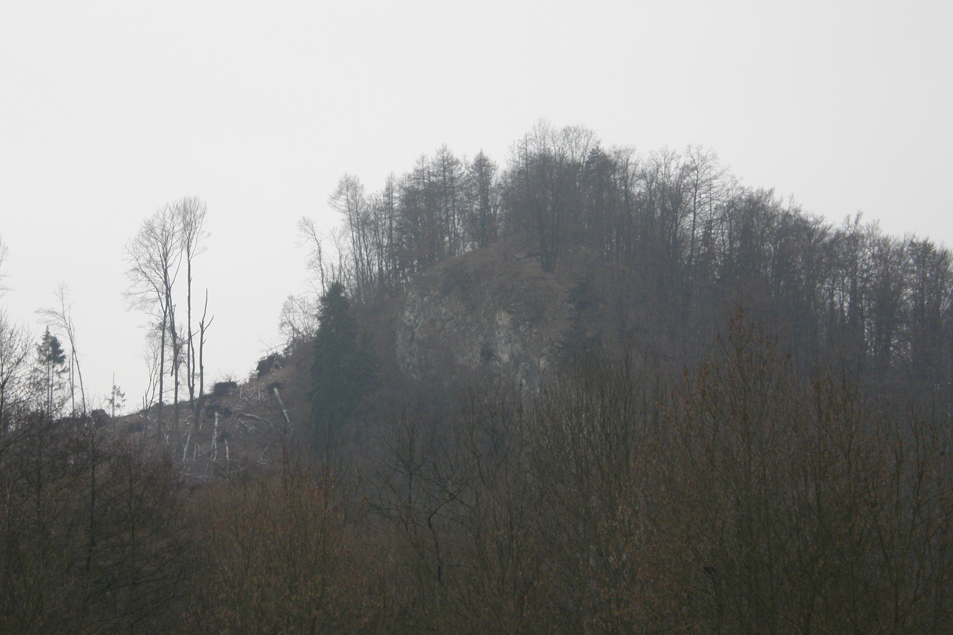 Pohled od Skalního mlýna na vrch s hradem Lečenec